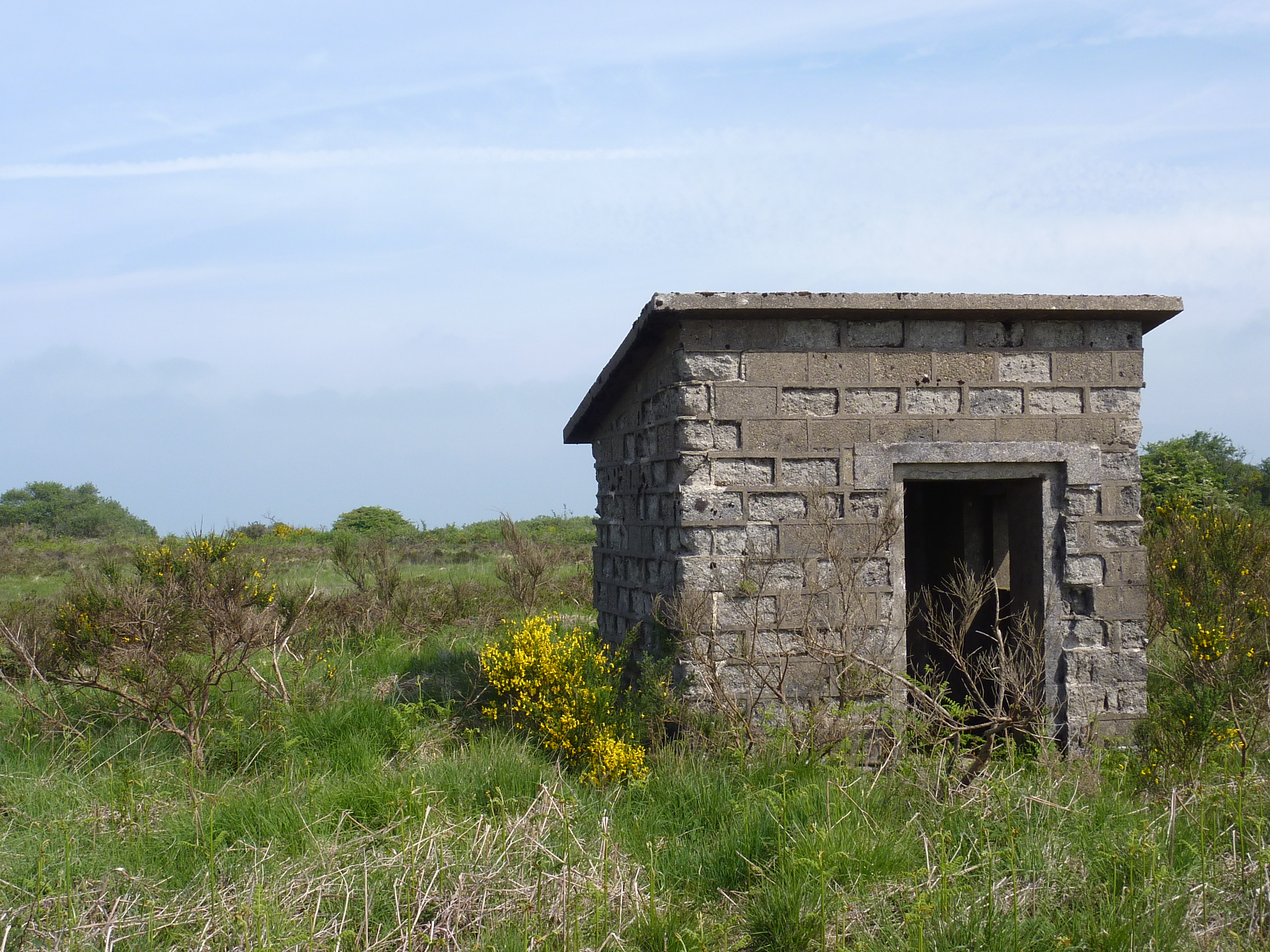 Guérite allemande datant de la seconde guerre mondiale dans les monts d'Arrée (au carrefour de la "route de la montagne" venant de Botmeur avec la route Quimper-Morlaix)